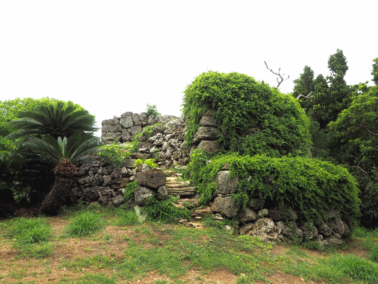 八重山遠見（沖縄県宮古郡多良間村多良間島）